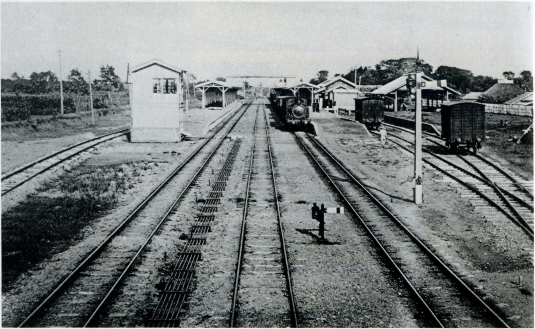 1905年(明治38年)頃の我孫子駅。